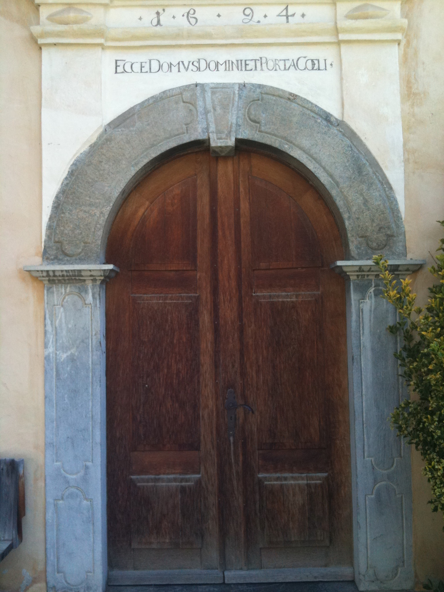 Portal der reformierten Kirche Almens im Kanton Graubünden